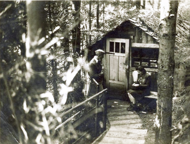 Partizanska bolnica R 10 nad Jurkloštrom pri Planini.